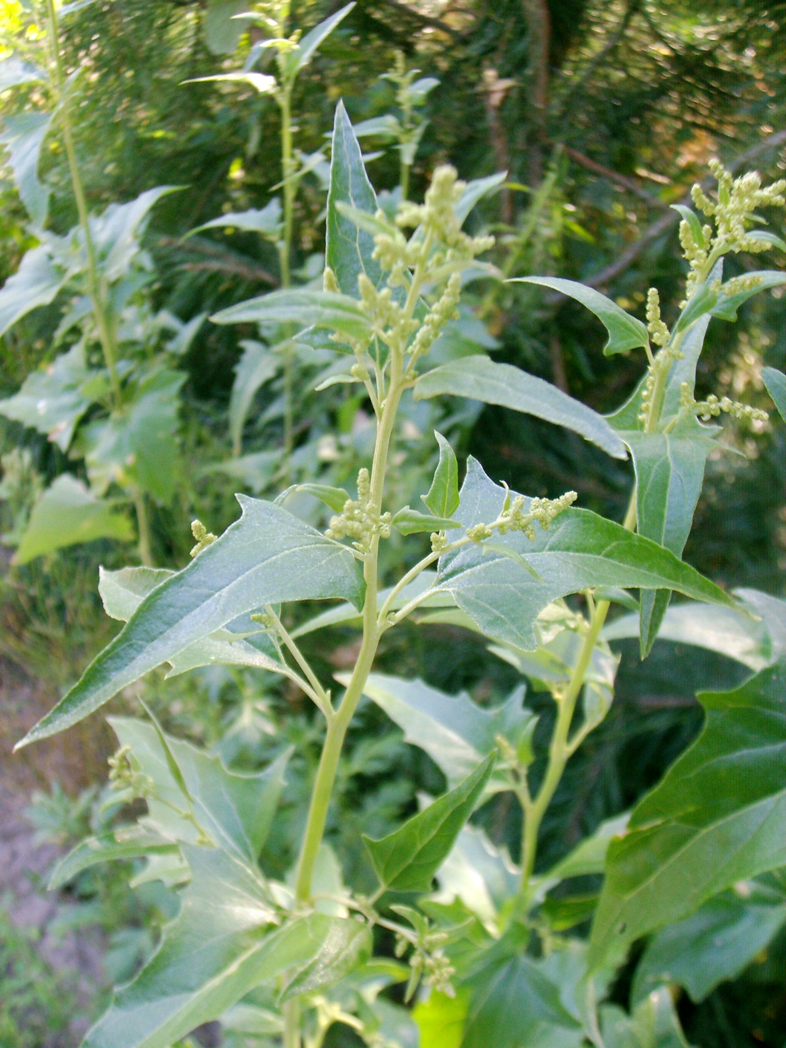 Atriplex sagittata (Syn. Atriplex nitens)